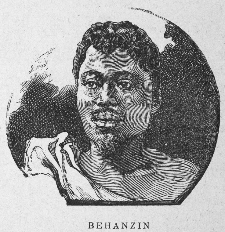 Behanzin